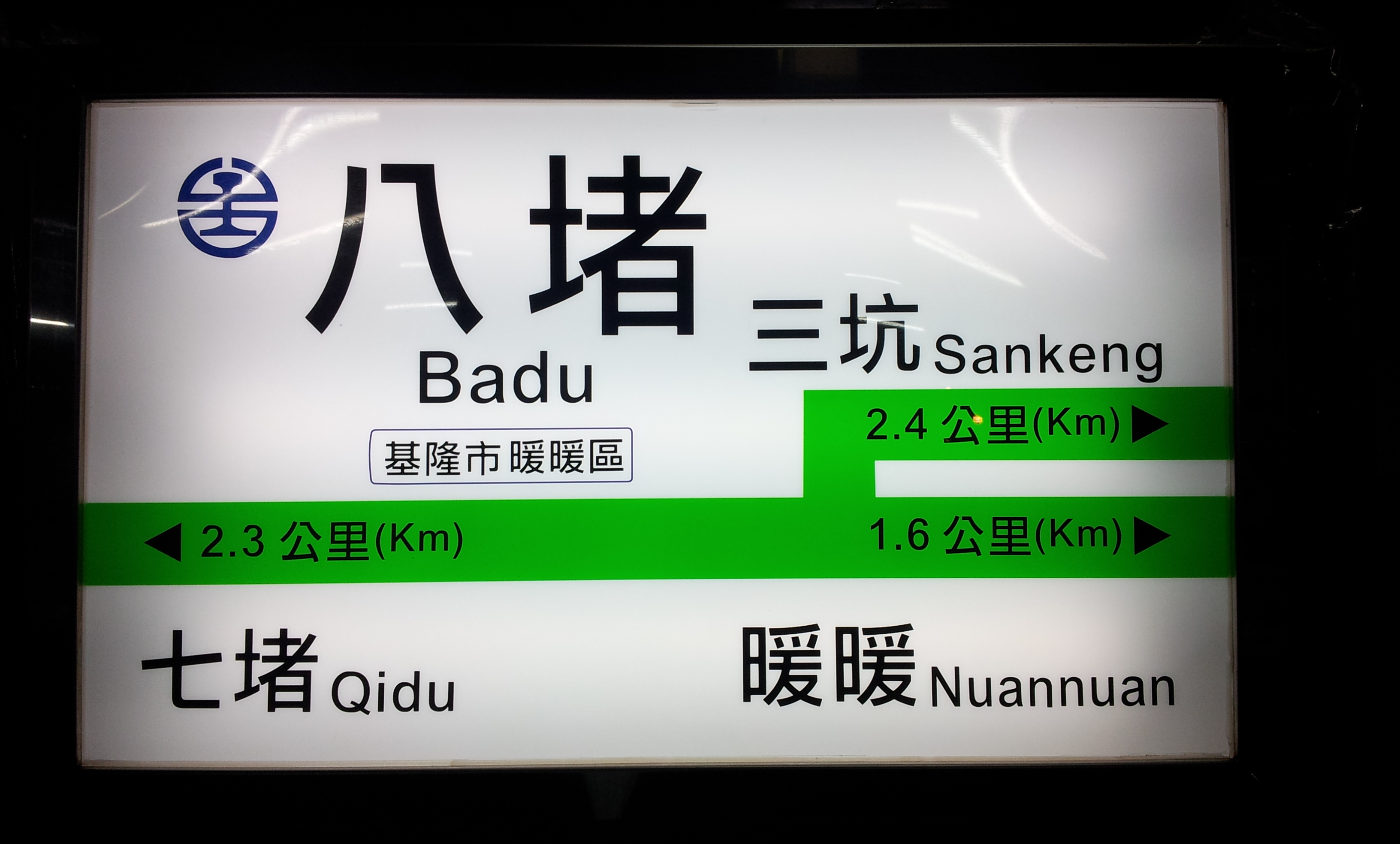 臺灣鐵路管理局八堵車站月台燈箱夜景。